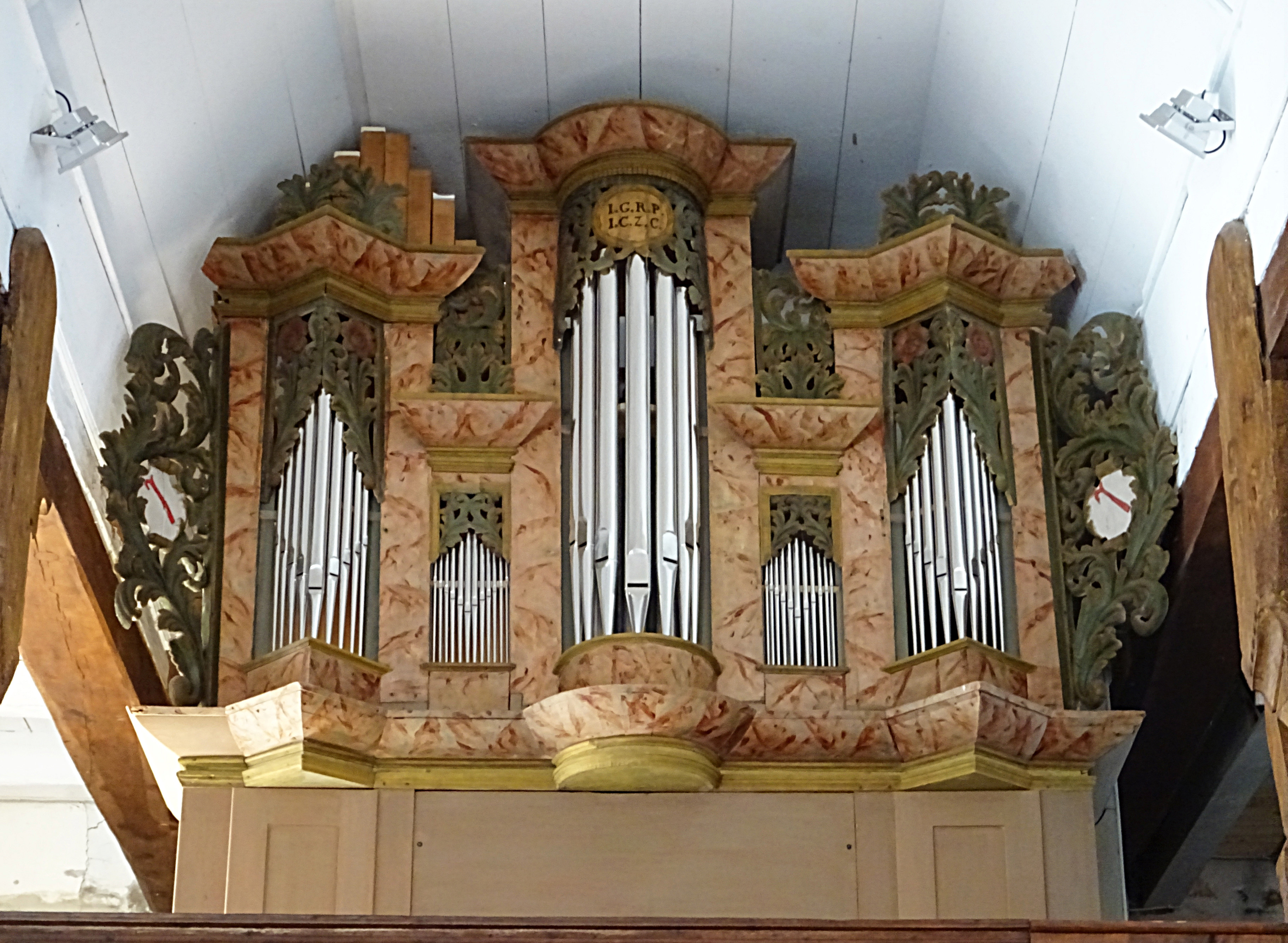 Orgel von Julius Strobel Söhne (1913) in St. Johannes der Täufer (Kaltohmfeld)